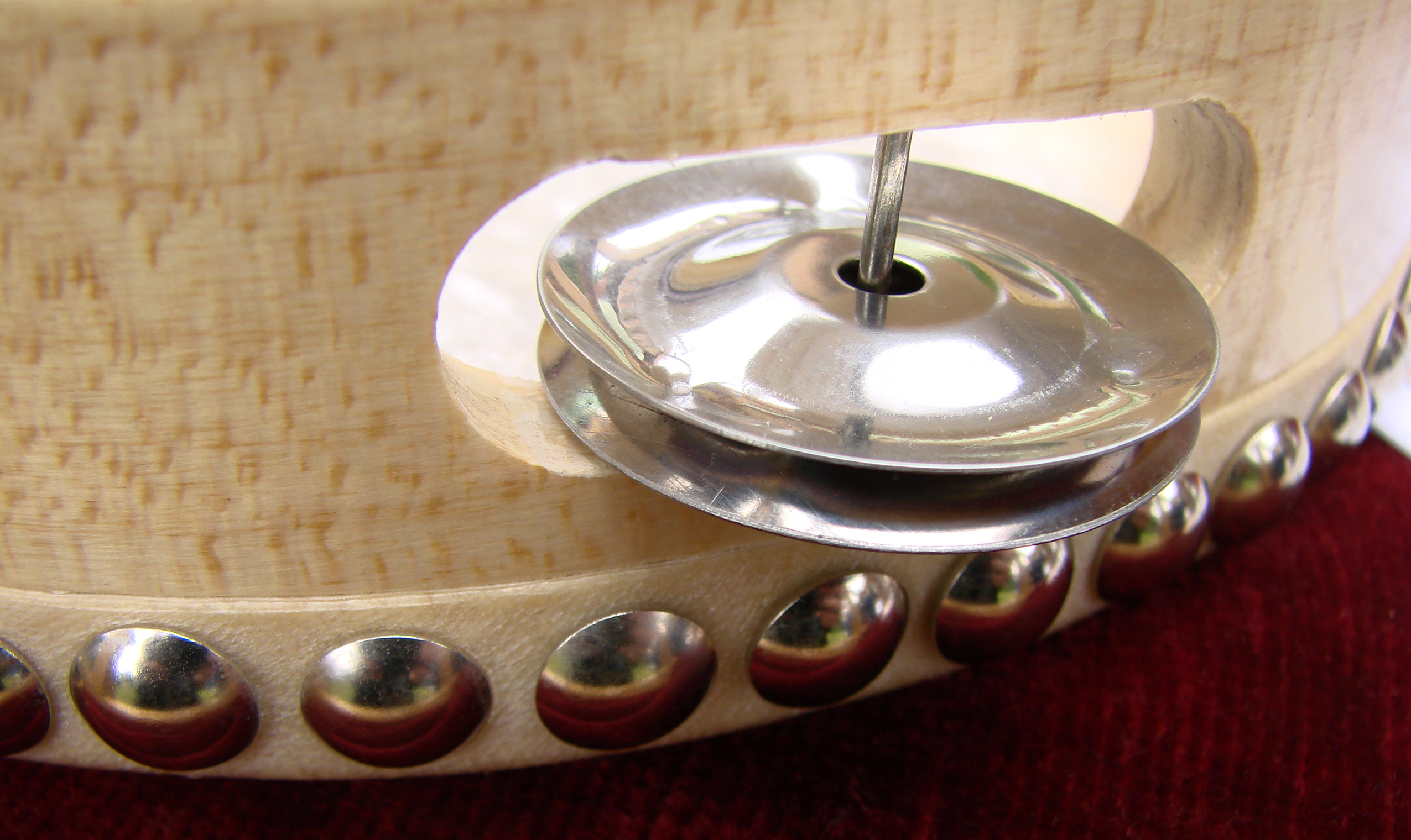 Détail d'un tambourin.